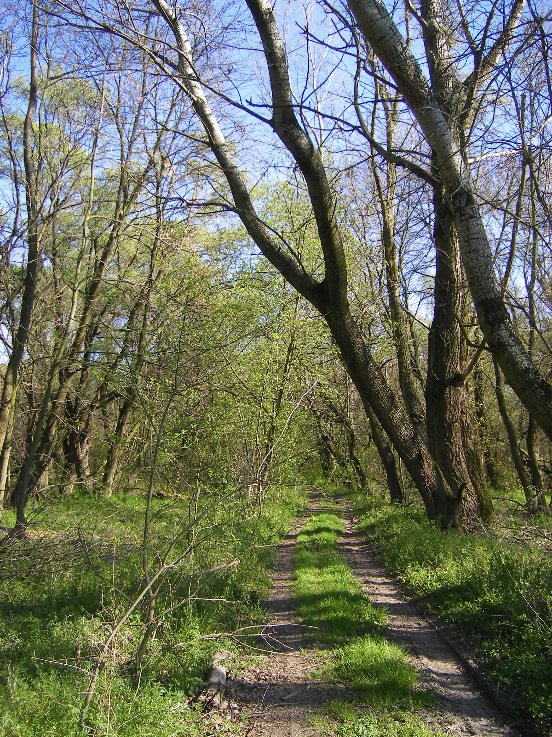 Chráněná krajinná oblast Apáli ve čtvrti Komárno-Lándor